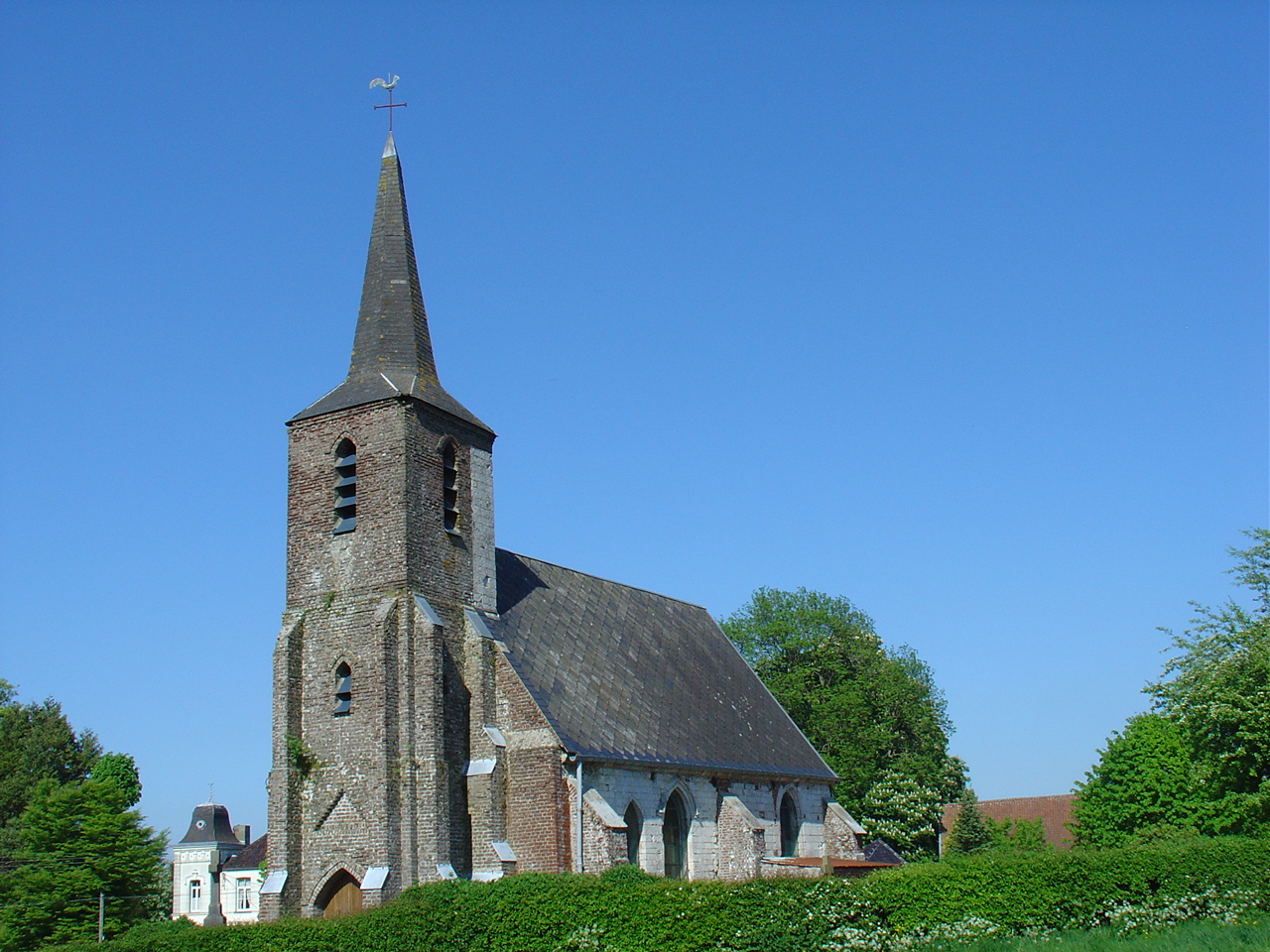 Église d'Herlincourt